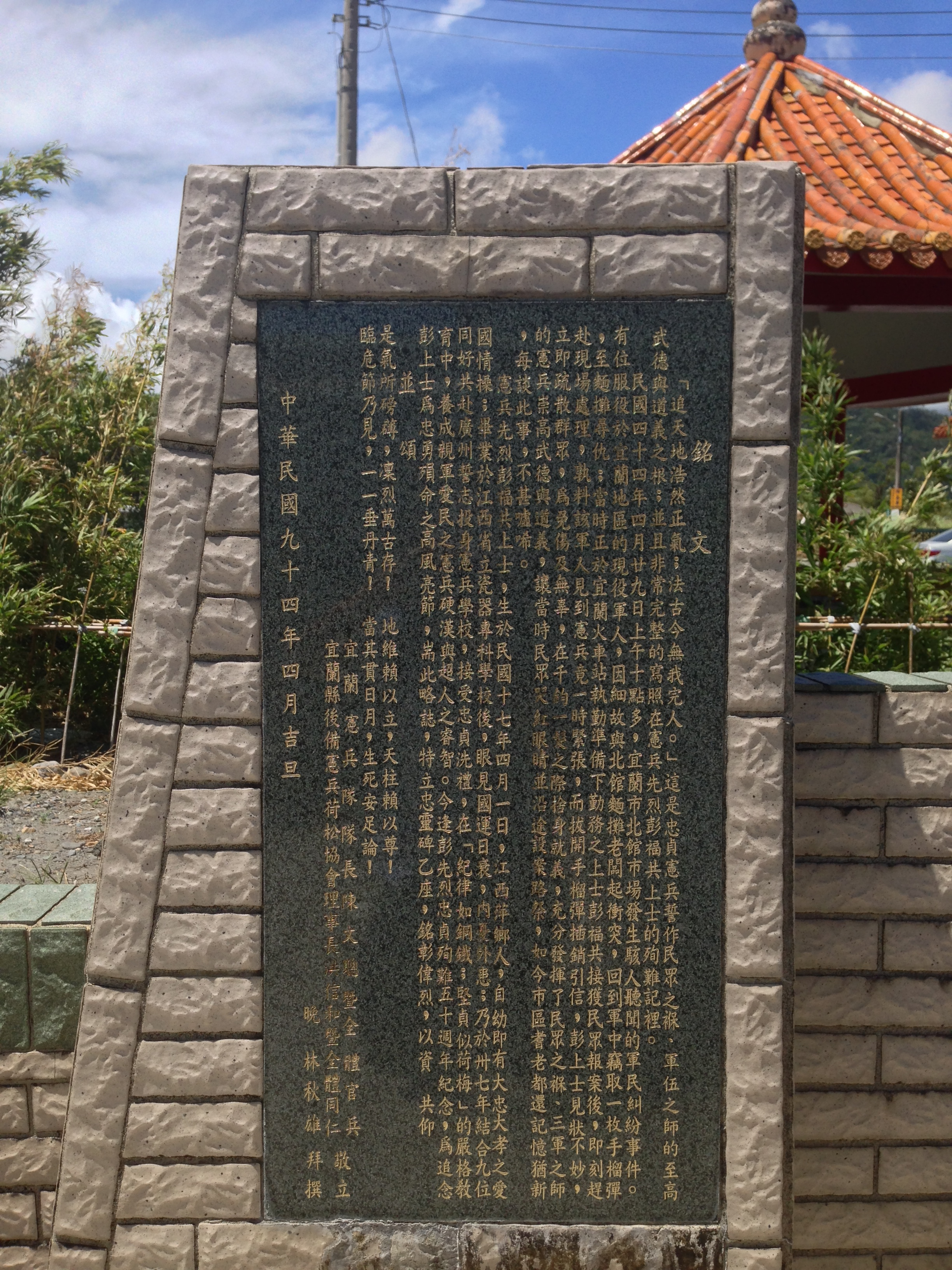 中文（台灣）: 彭福共忠靈碑文